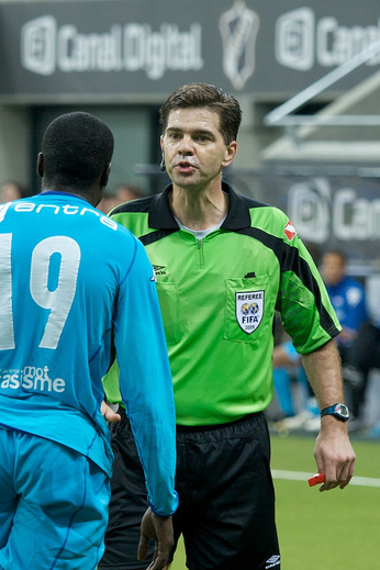 Terje Hauge og Dawda Leigh